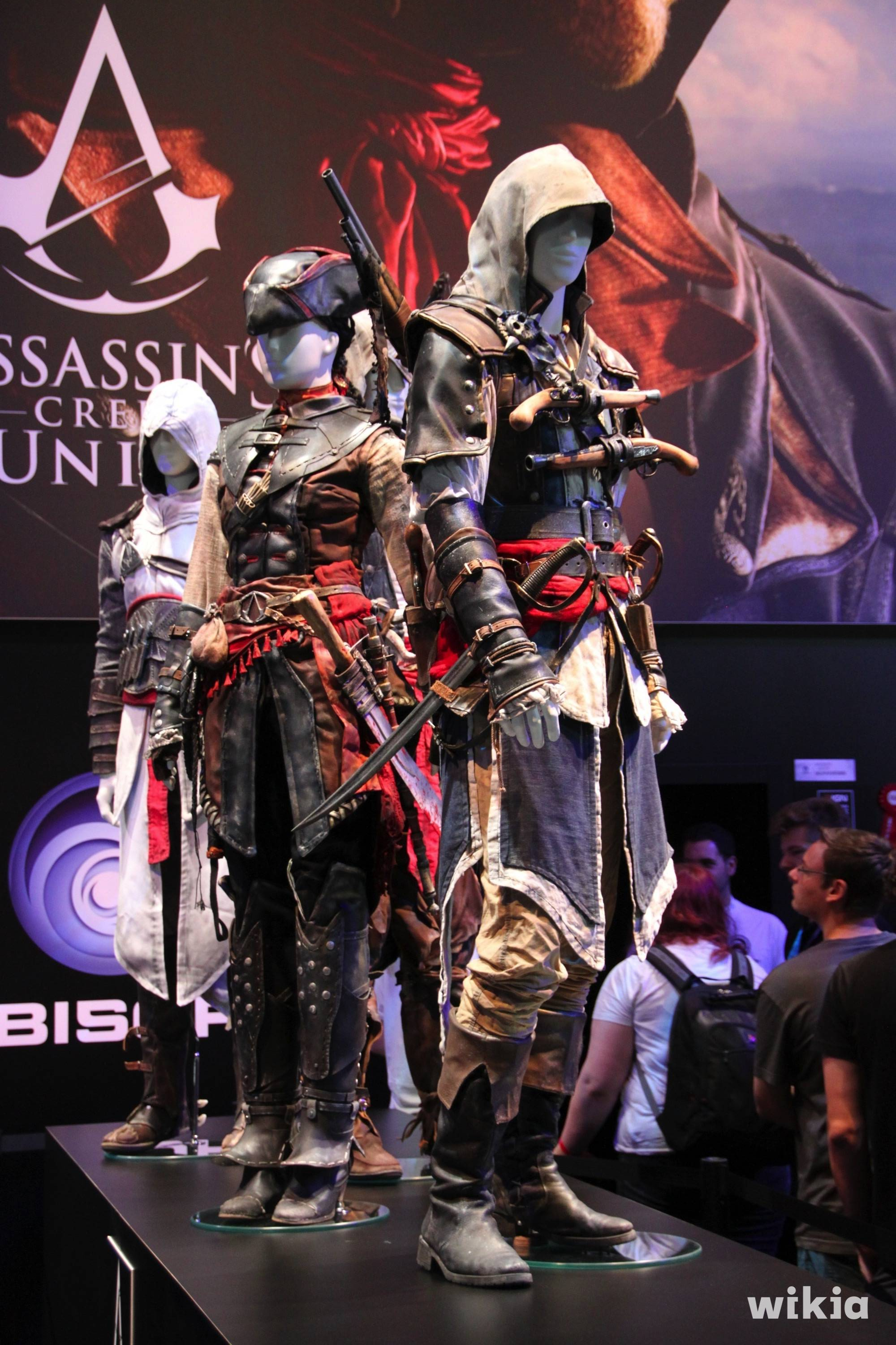 Impressionen: Erster Tag, Mittwoch. Mehr auf